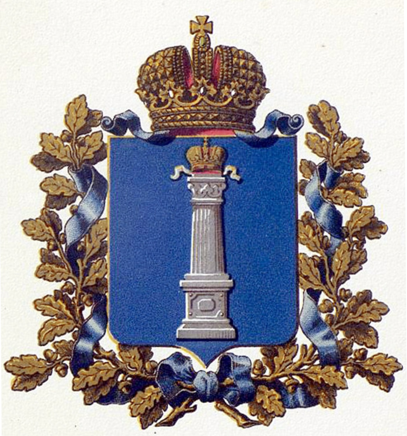 Official Russian Empire coat of arms Simbirsk Governorate. Герб Российской Империи Симбирской губернии в Гербовнике МВД. Утверждён Императором Всероссийским Александром Вторым.